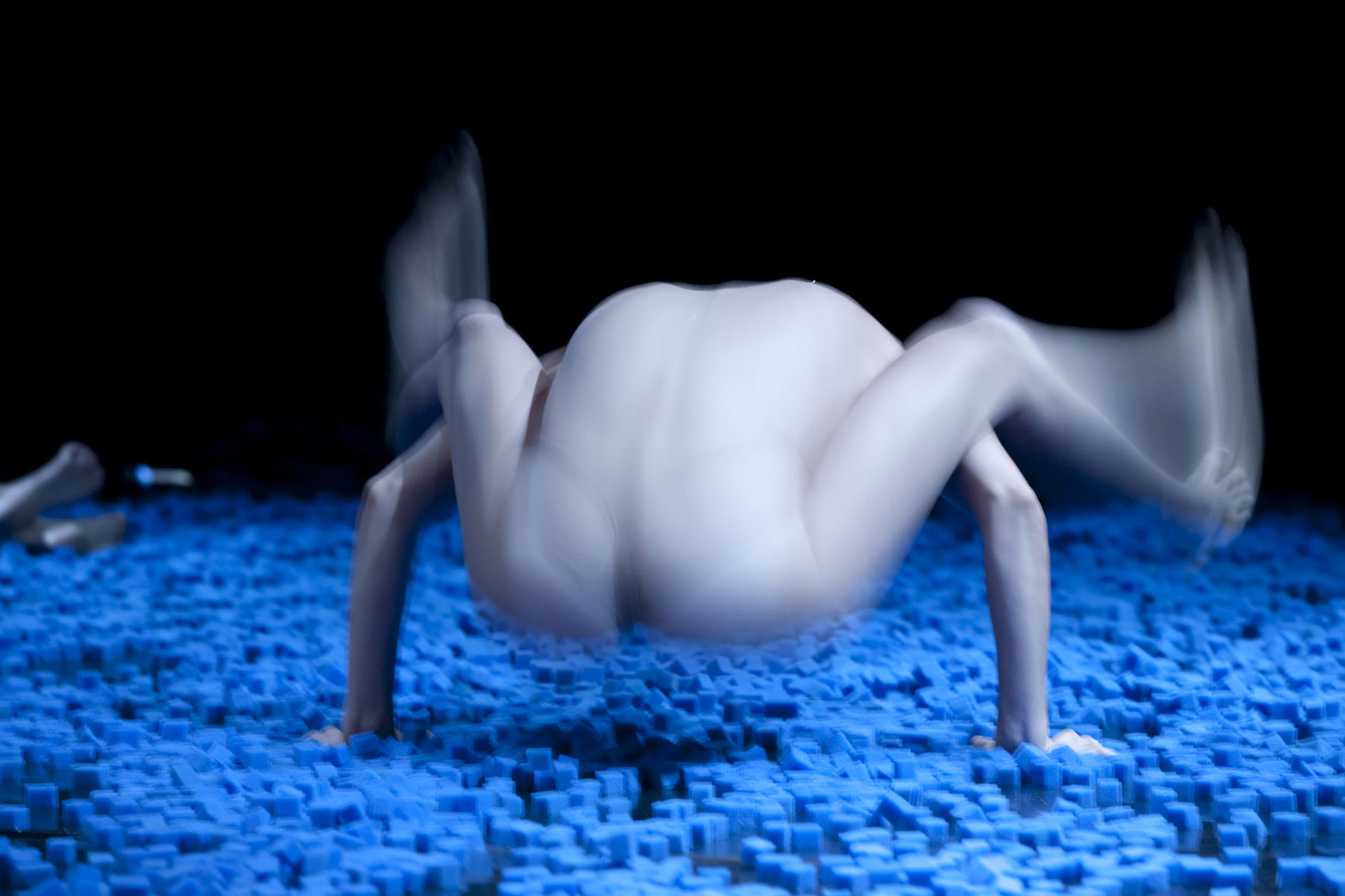 editta braun company 2012. Planet